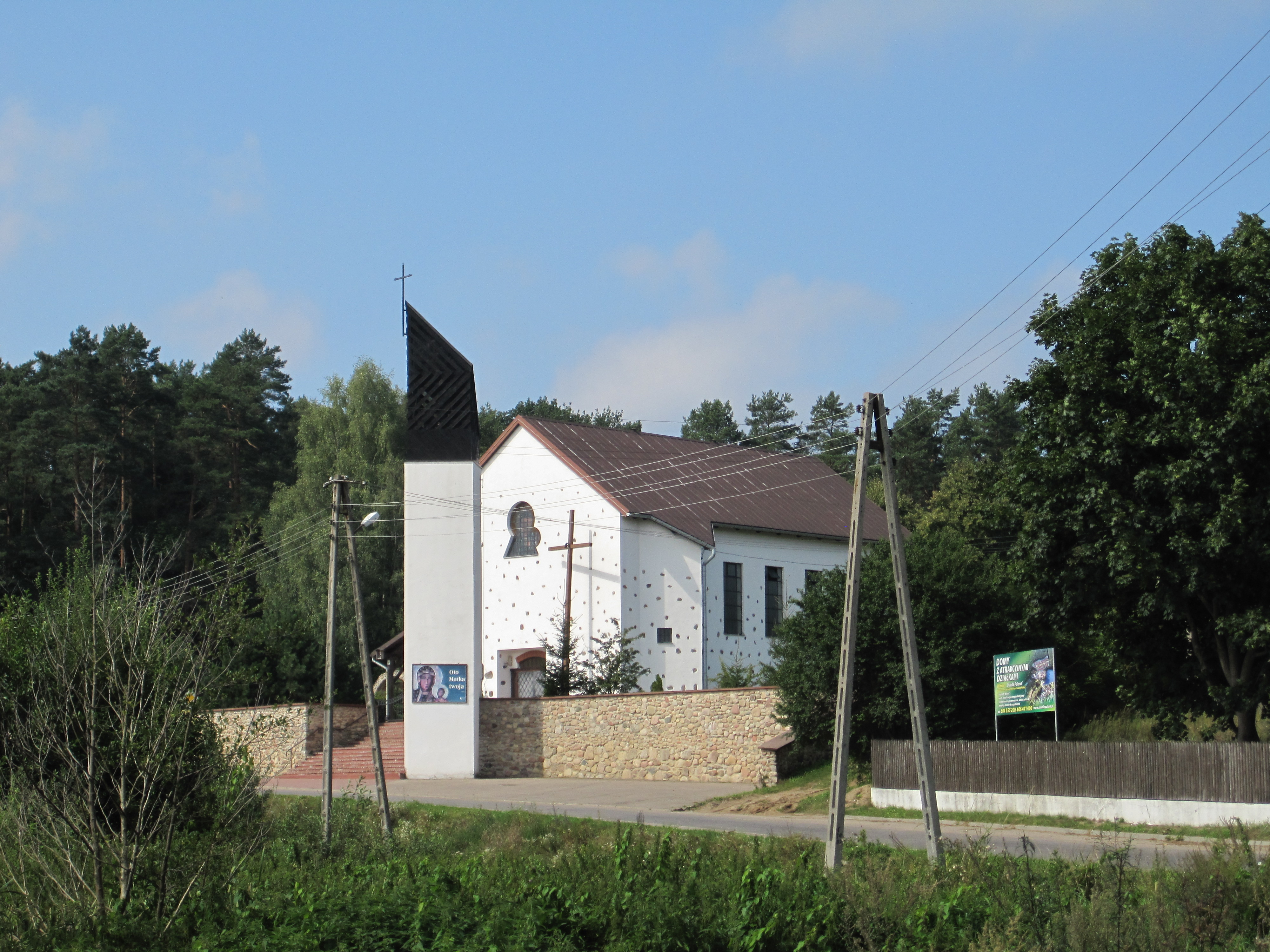 Wiartel - church of St. Maximilian Kolbe